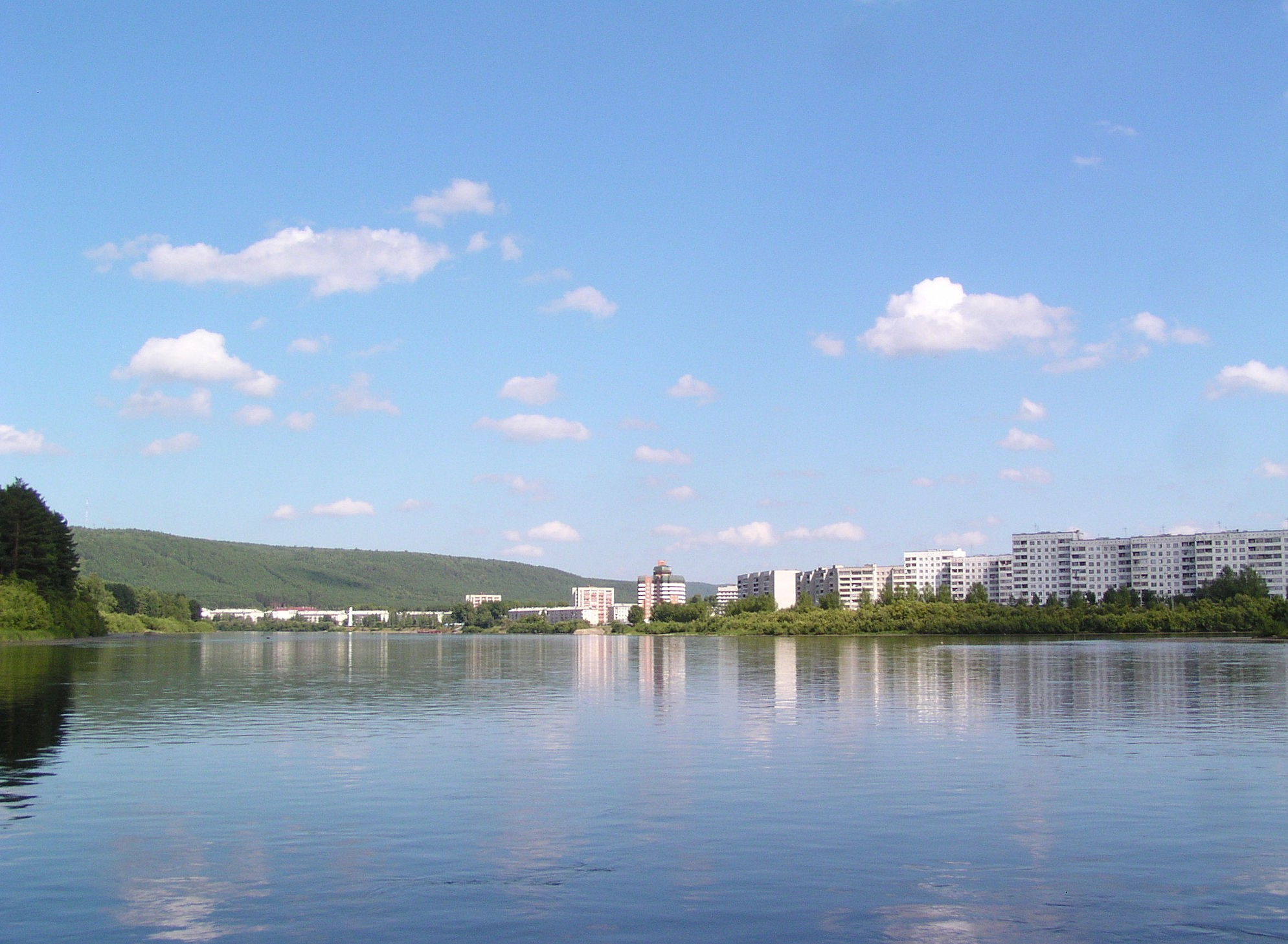 Зеленогорск